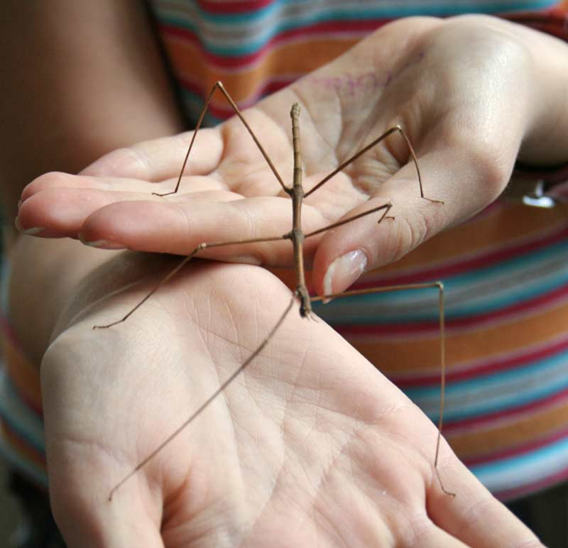 Stabschrecke auf Kinderhand